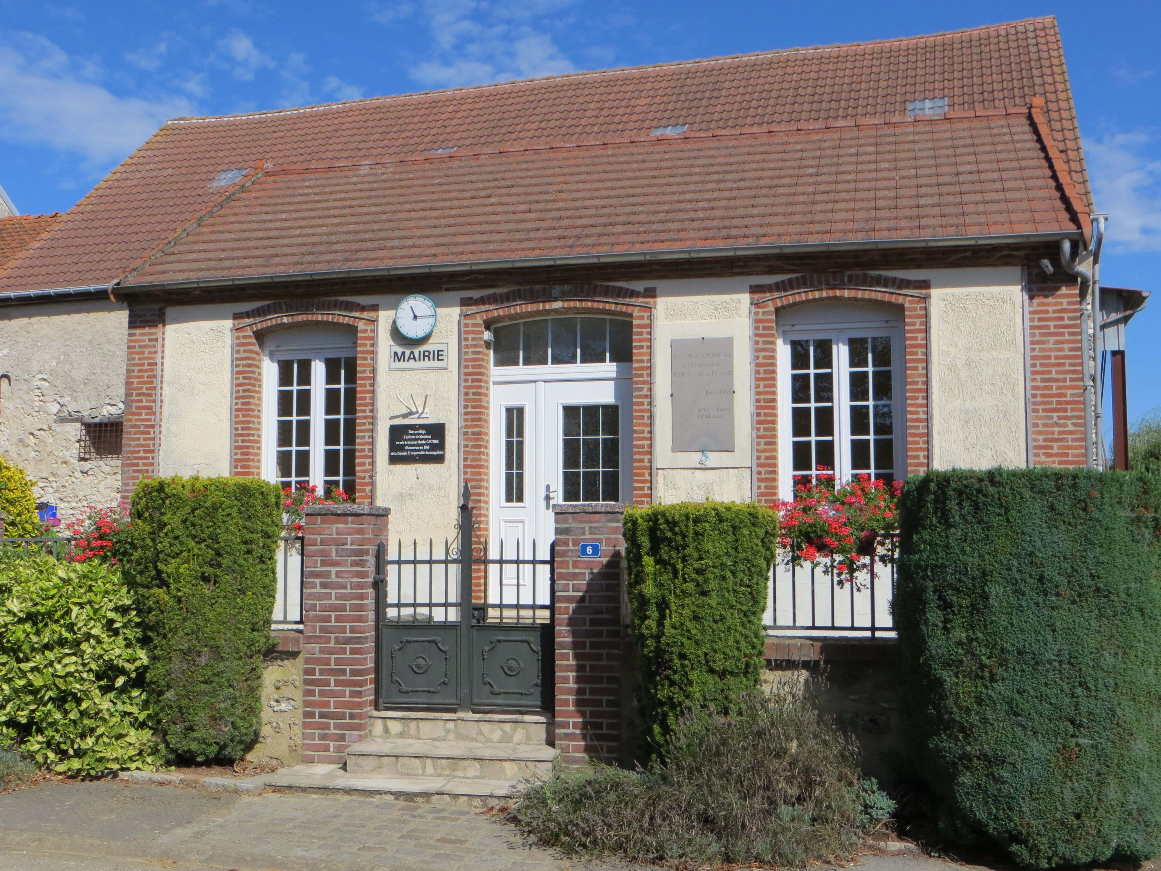 Mairie du village, adaptée à sa population